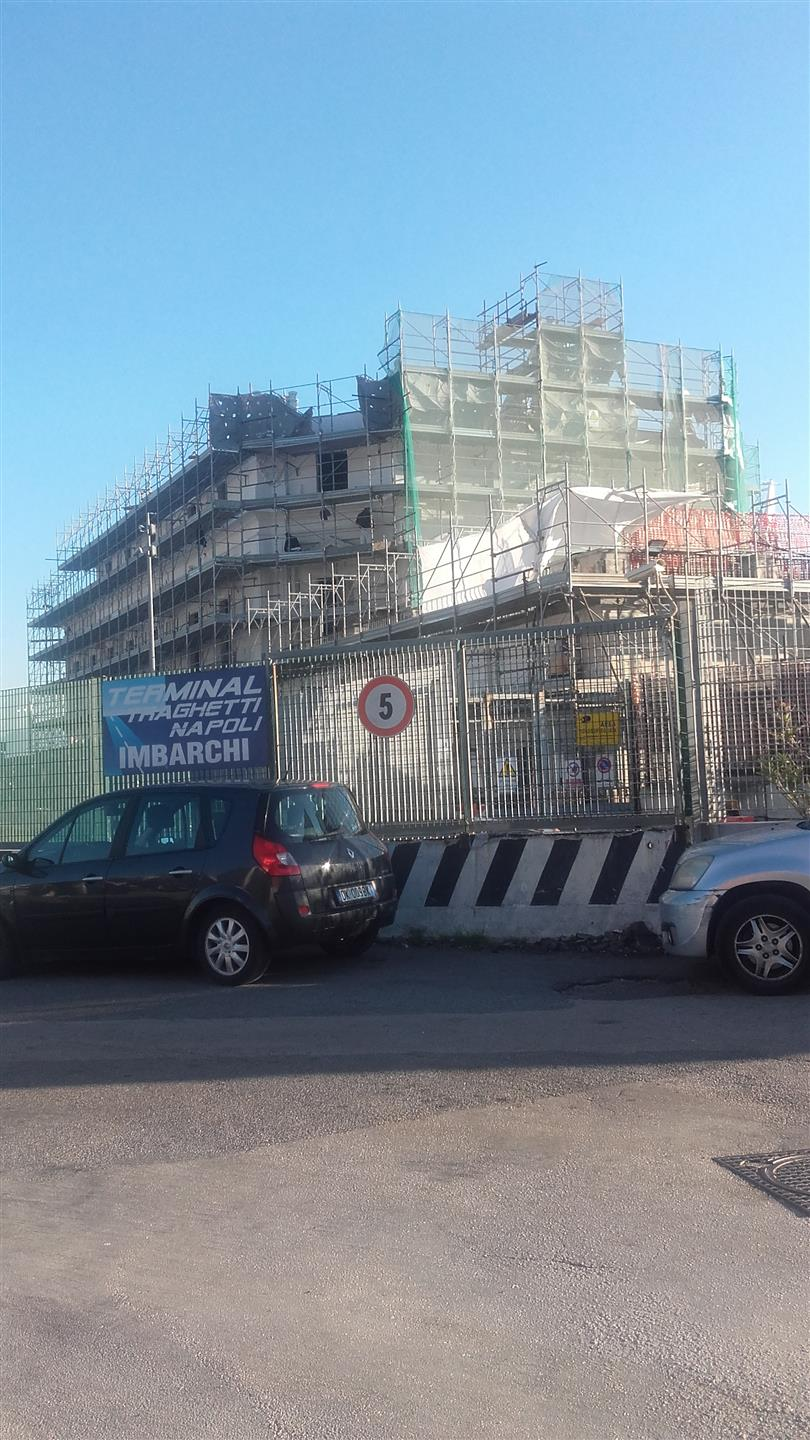 Importante realizzazione architettonica di Domenico Antonio Vaccaro.